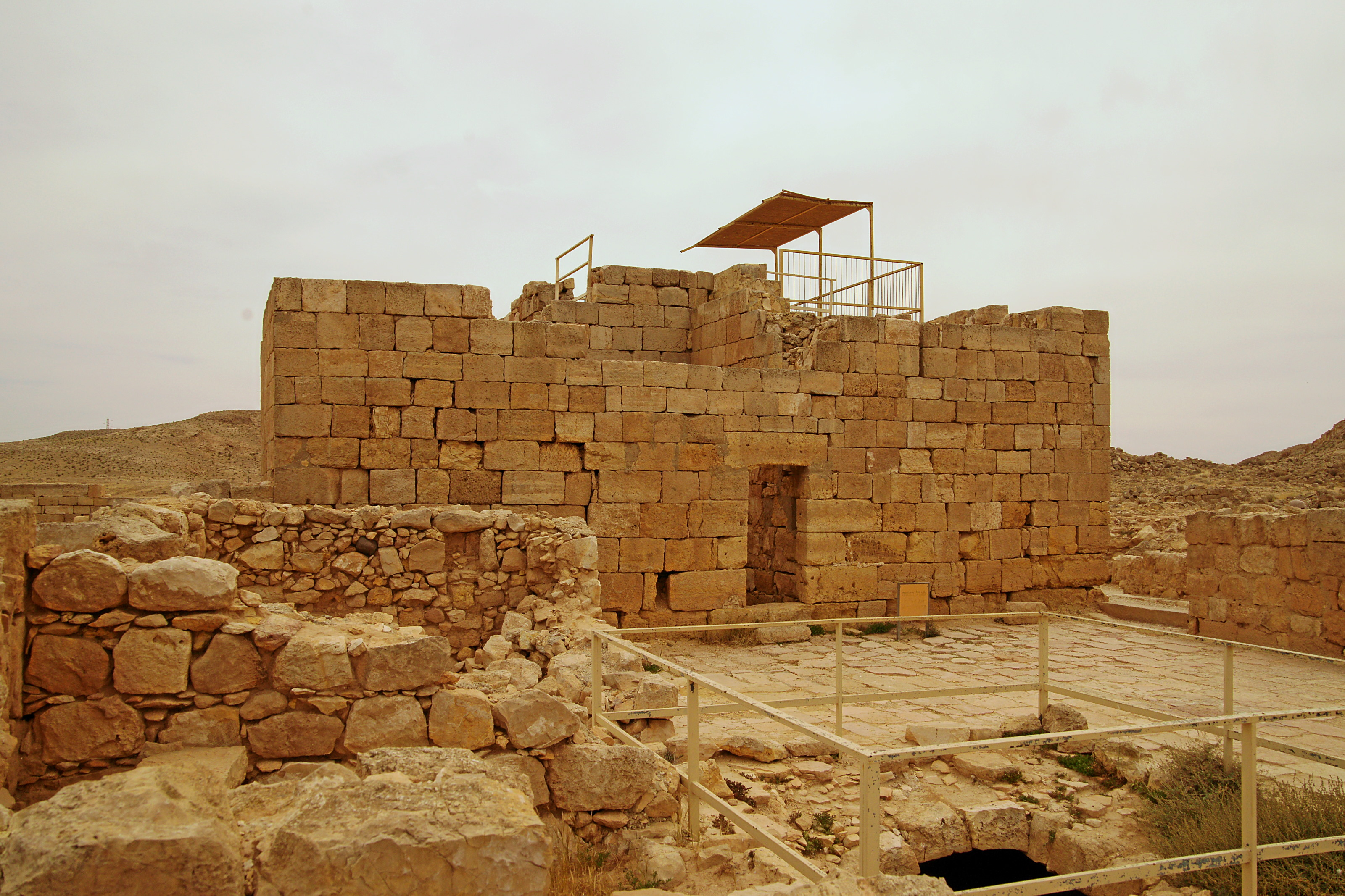 Mamshit: Wachturm